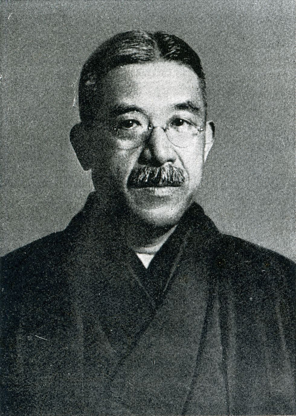 この写真は、床次竹二郎（1867-1935）の犬養内閣時における写真です。